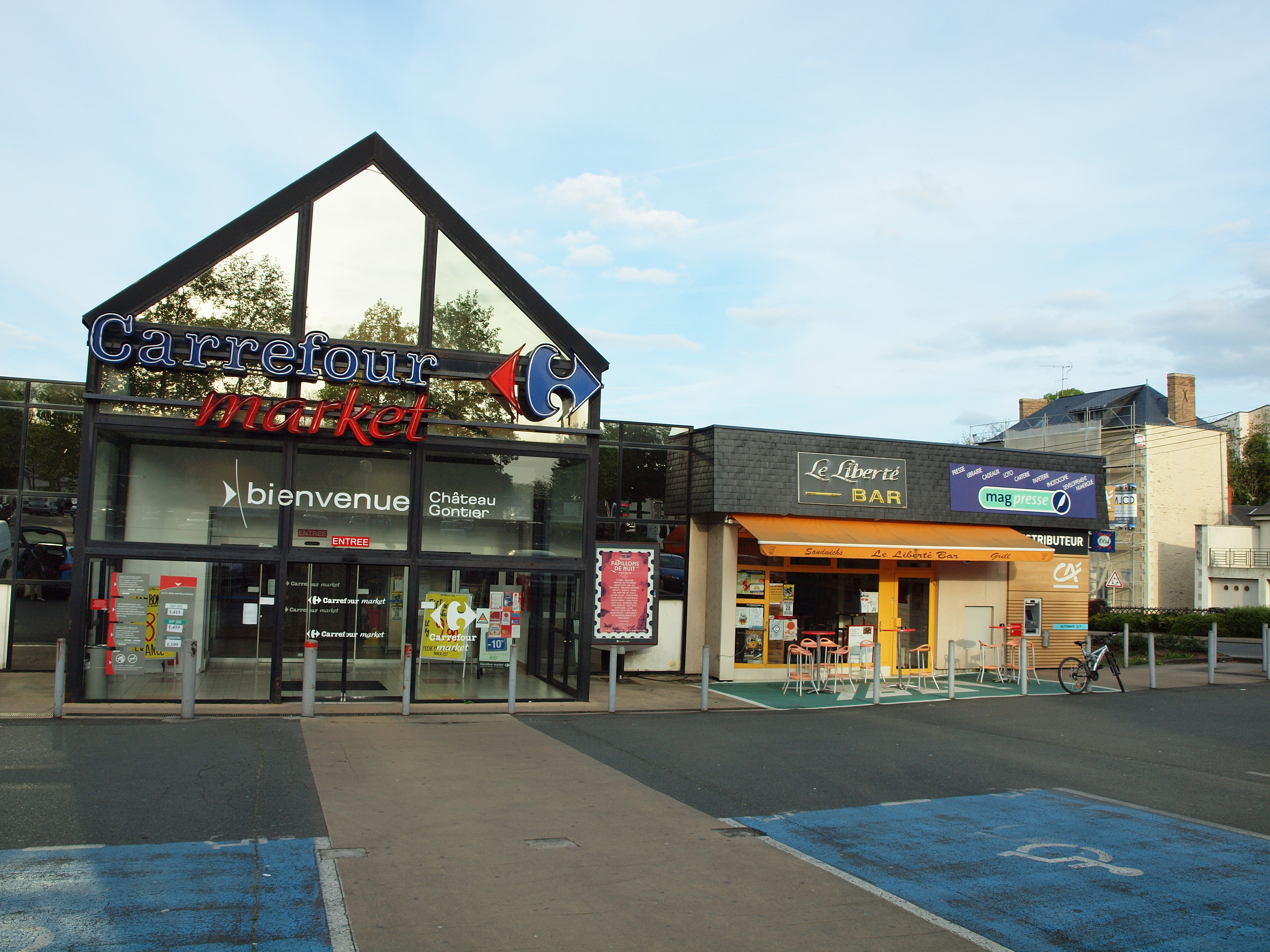 Château-Gontier (Mayenne, France)